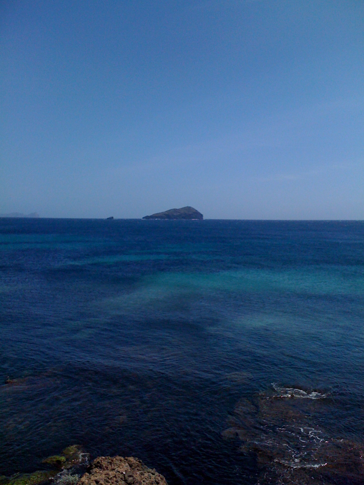 Die Insel Vacca von Sant’Antioco (Carbonia-Iglesias, Sardinien) aus gesehen